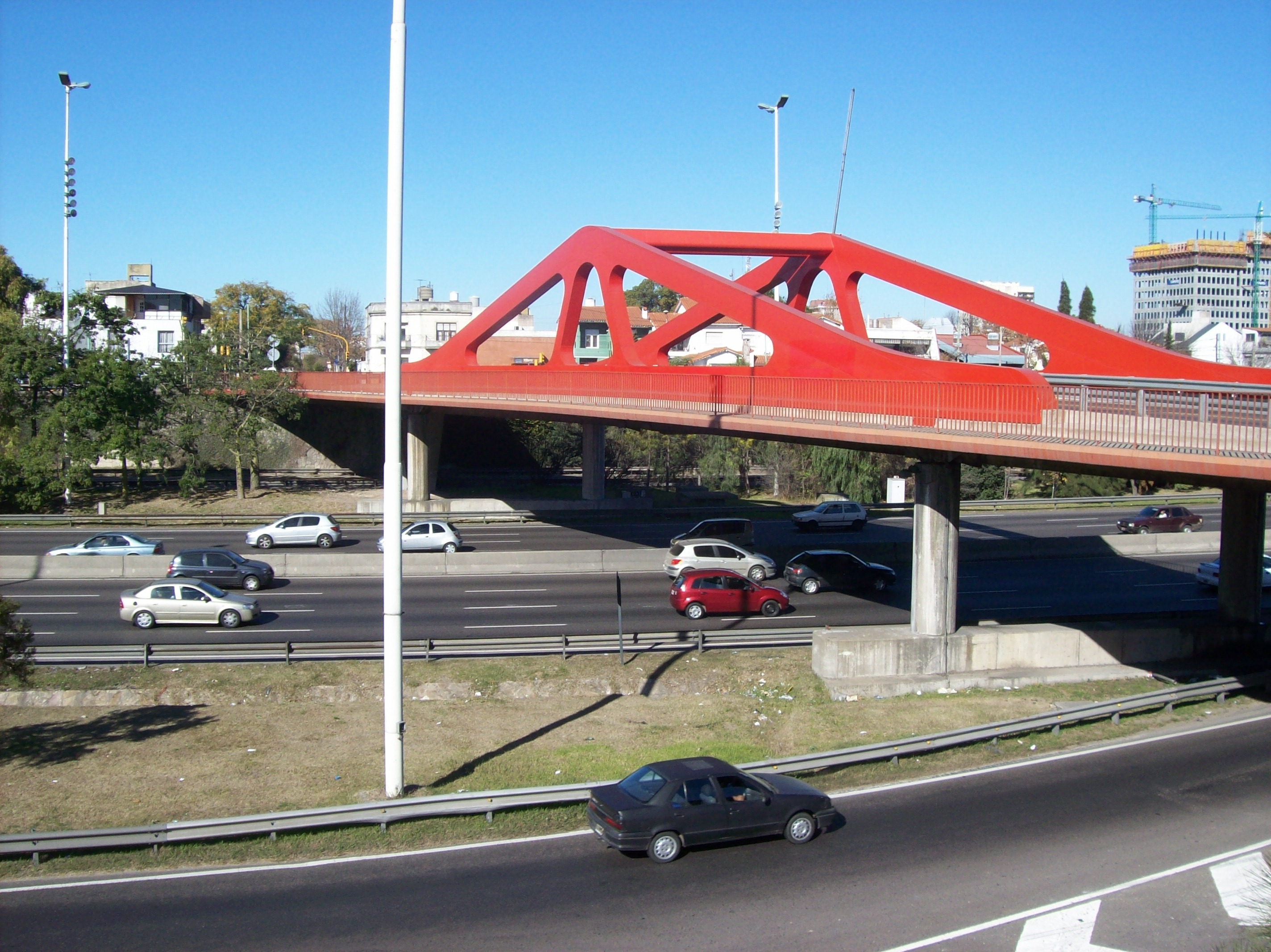 Puente de la calle Superí sobre la Avenida General Paz. Al fondo, Ciudad de Buenos Aires, Argentina.